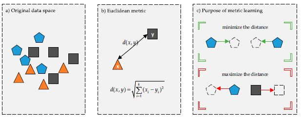 یادگیری متریک، یادگیری شباهت